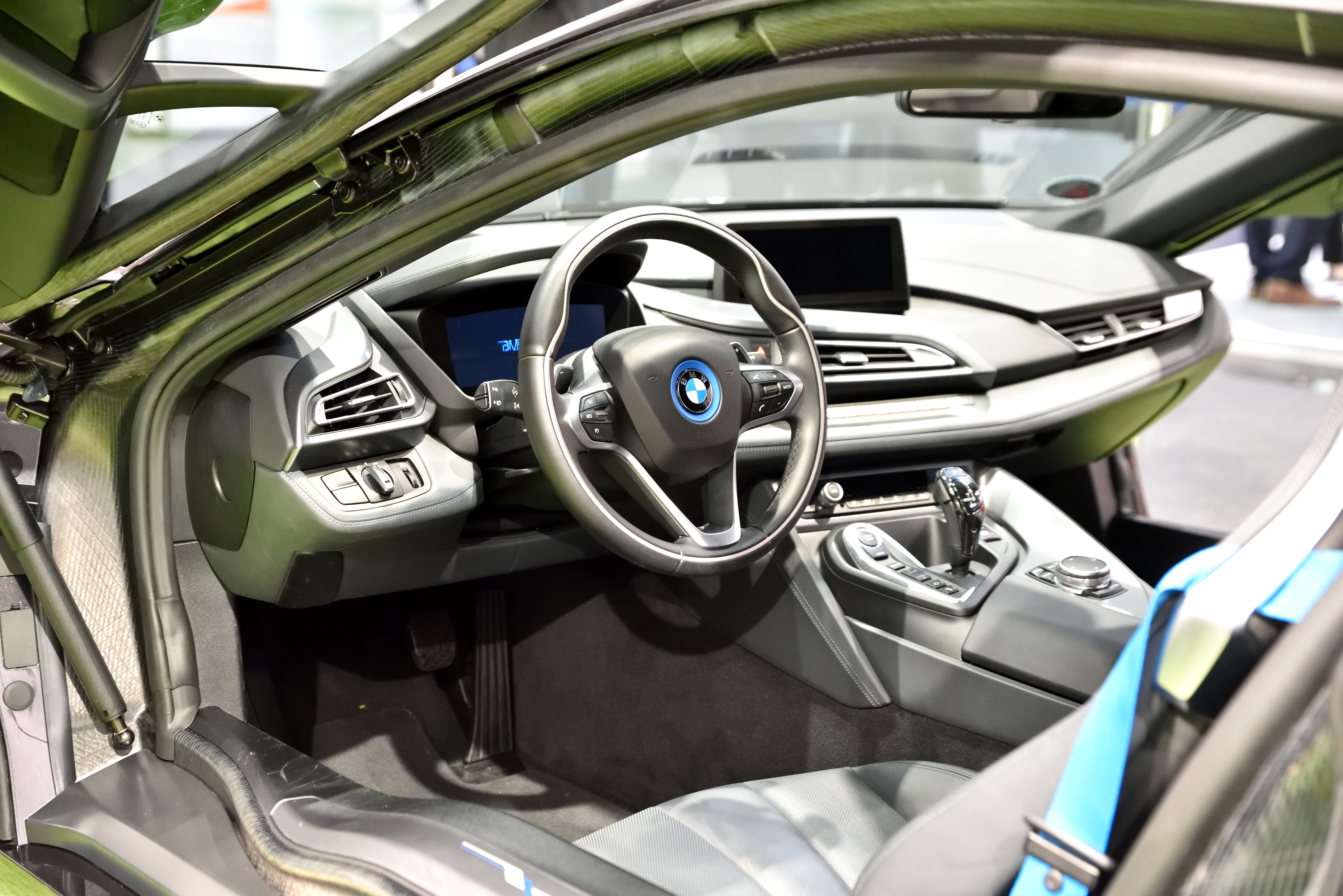 Innenansicht BMW i8 der CeBIT 2016 in Hannover